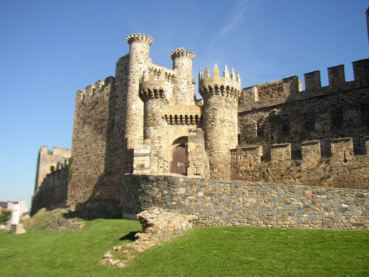 Castillo medieval de Ponferrada. Vuela hasta esta localización Necesitas el programa Google Earth